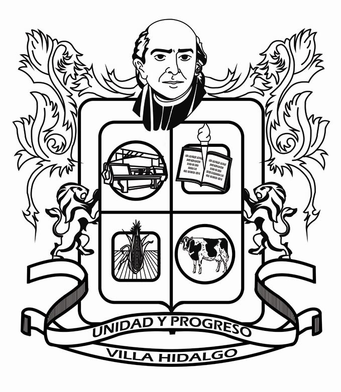 Escudo de armas de Villa Hidalgo Jalisco, Mexico.